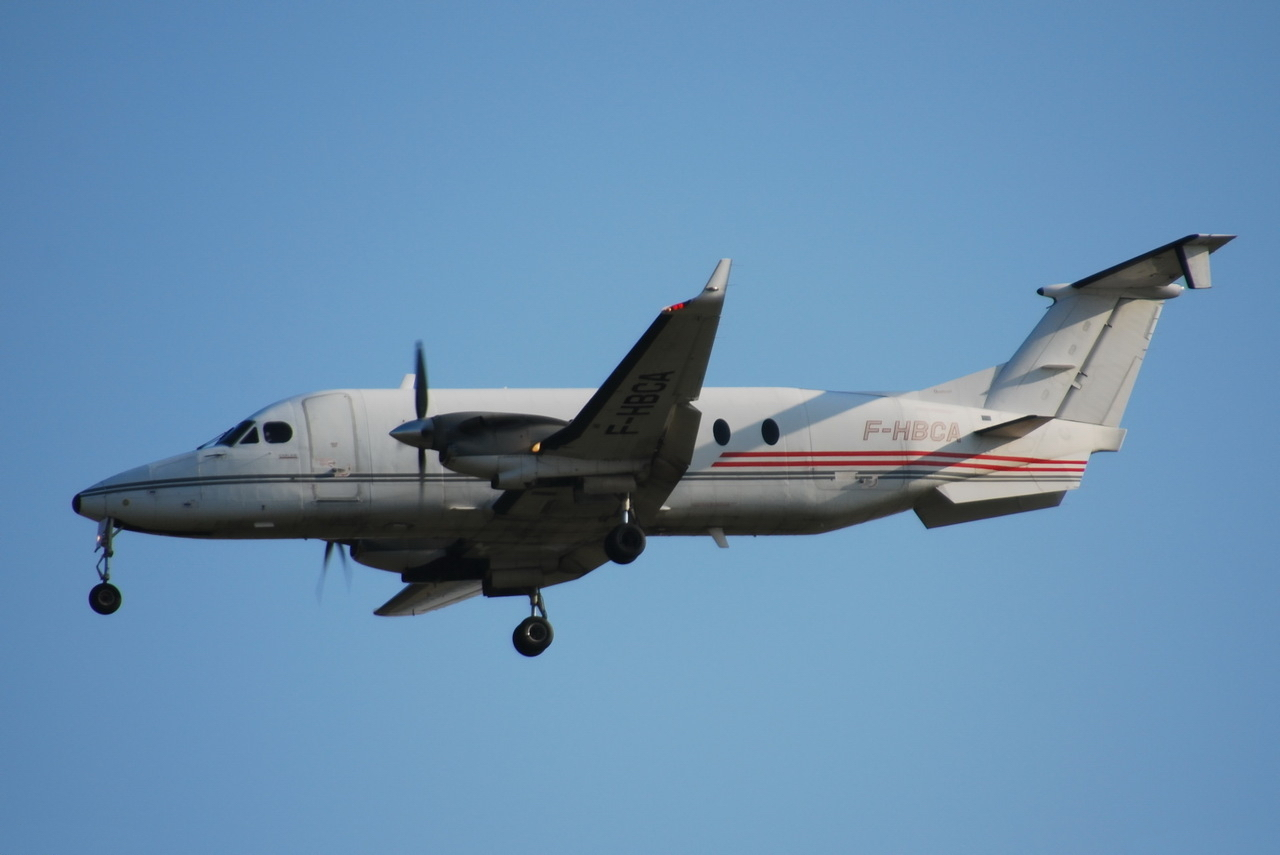 Photo prise à l'aéroport de Toulouse-Blagnac (LFBO) en France. Picture take at Toulouse-Blagnac Airport (LFBO) in France.